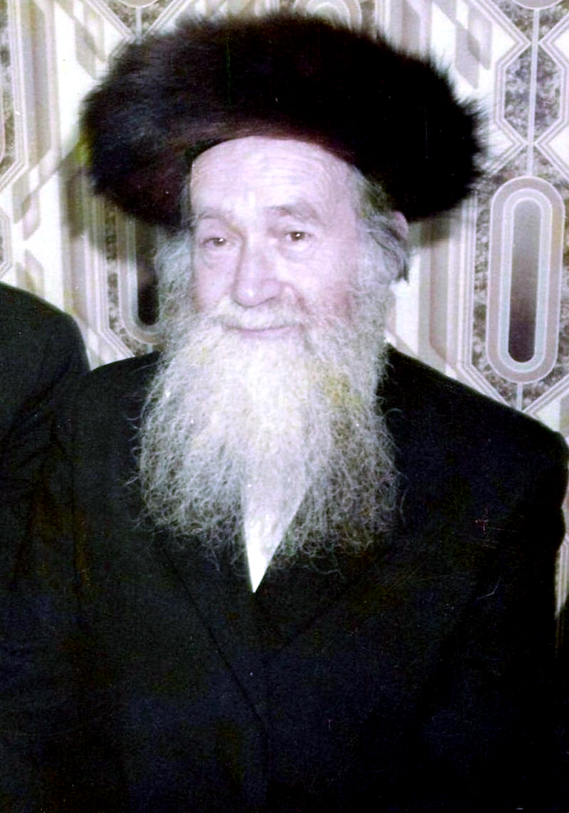 אברהם יעקב זלזניק